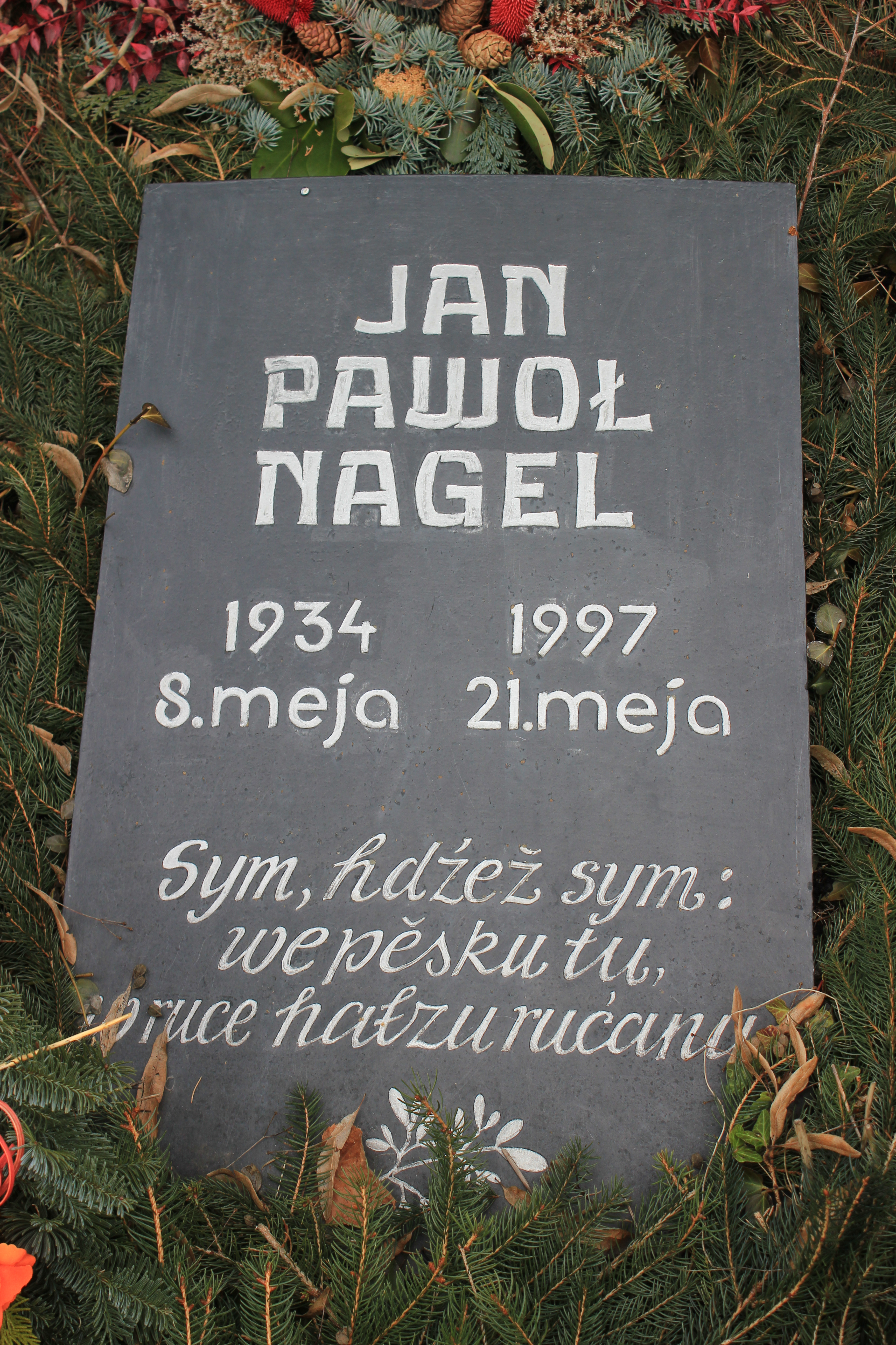 Hornjoserbsce: Narowny kamjeń Jana Pawoła Nagela na Łazowskim kěrchowje.